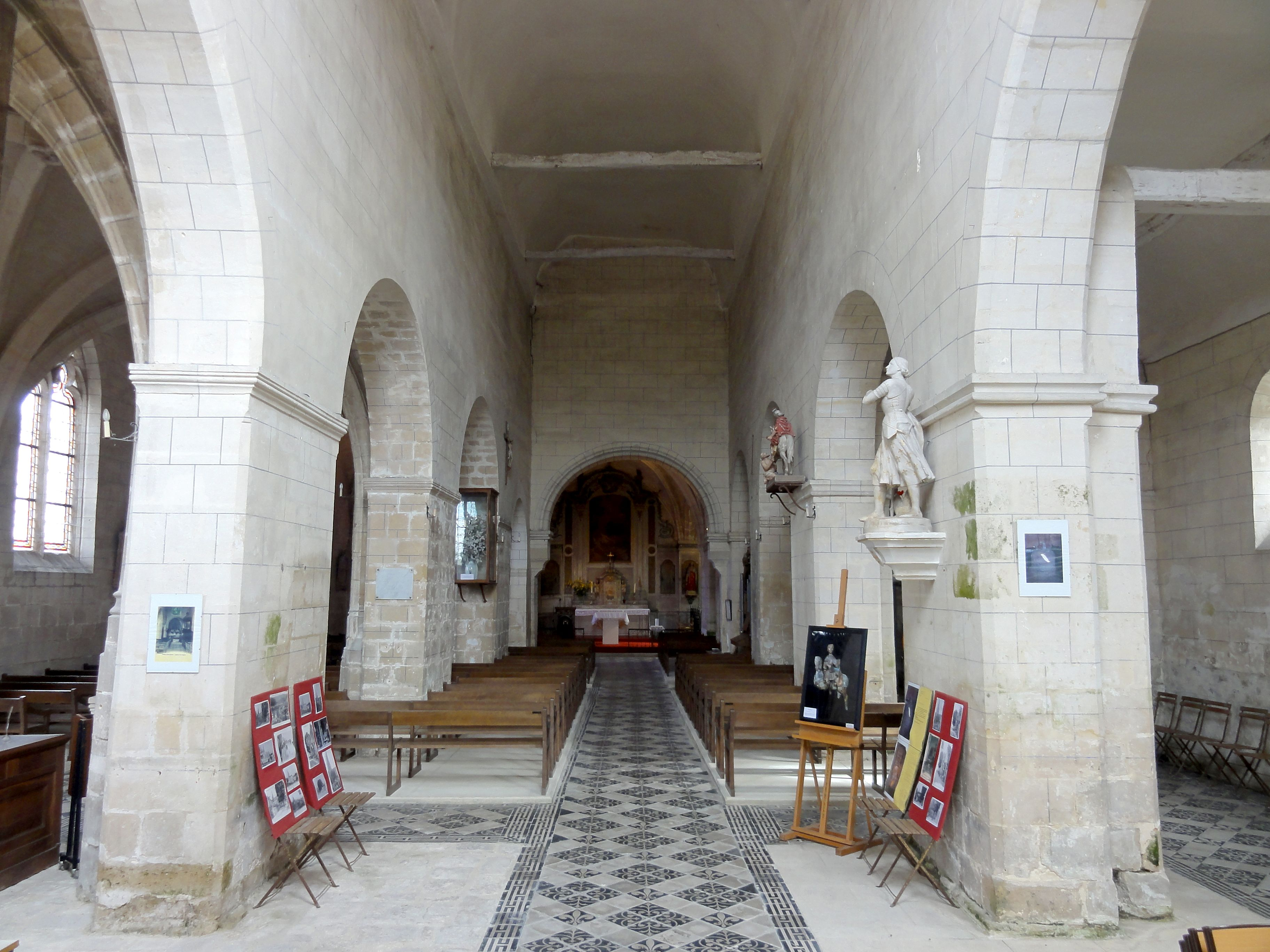 Nef, vue vers l'est.